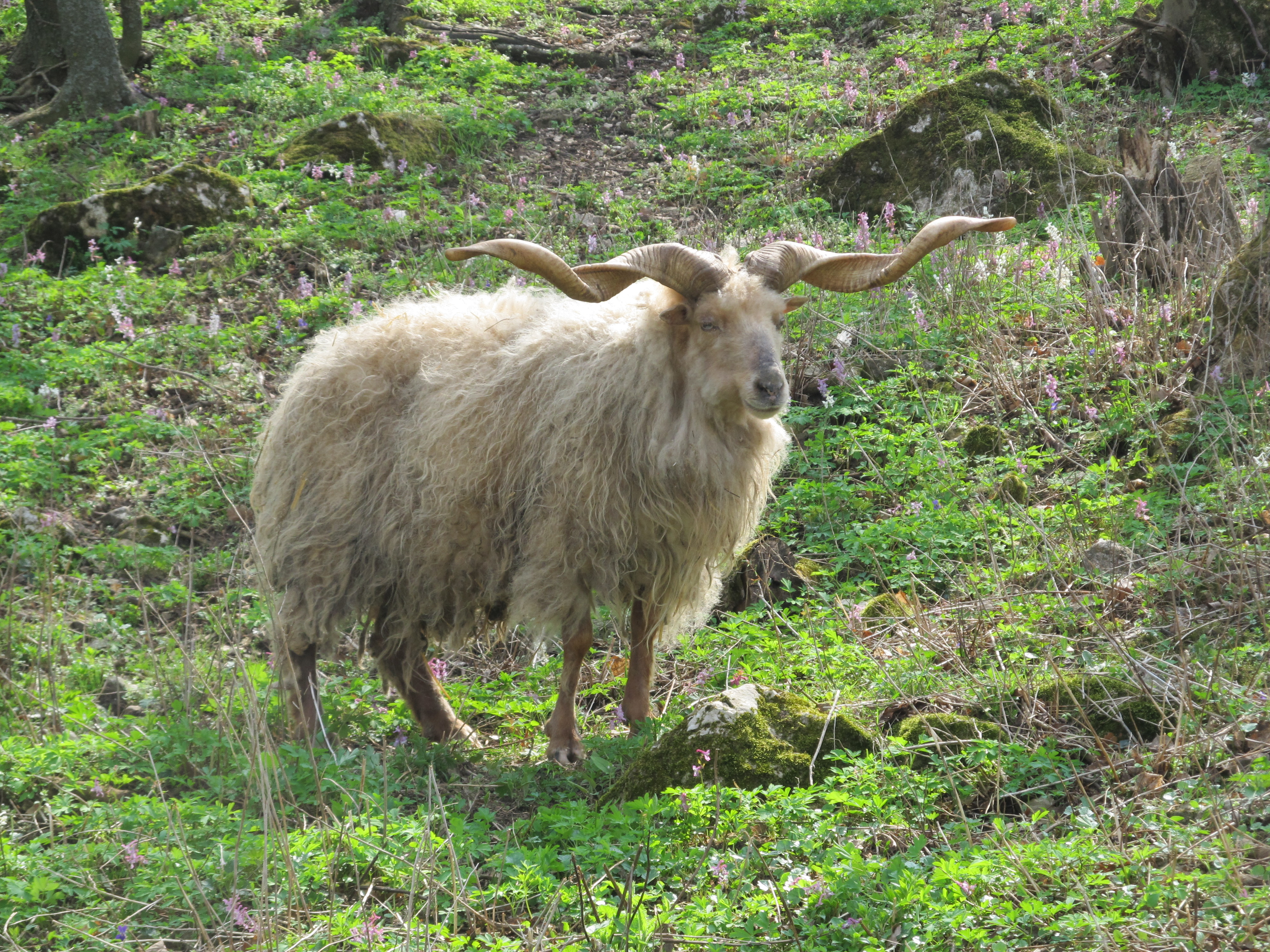 Racka kos